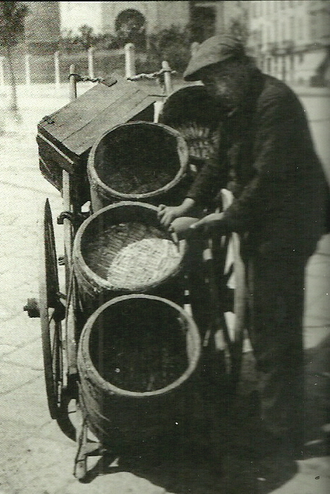 Un acciugaio a porta Lodovica a Milano (1920)